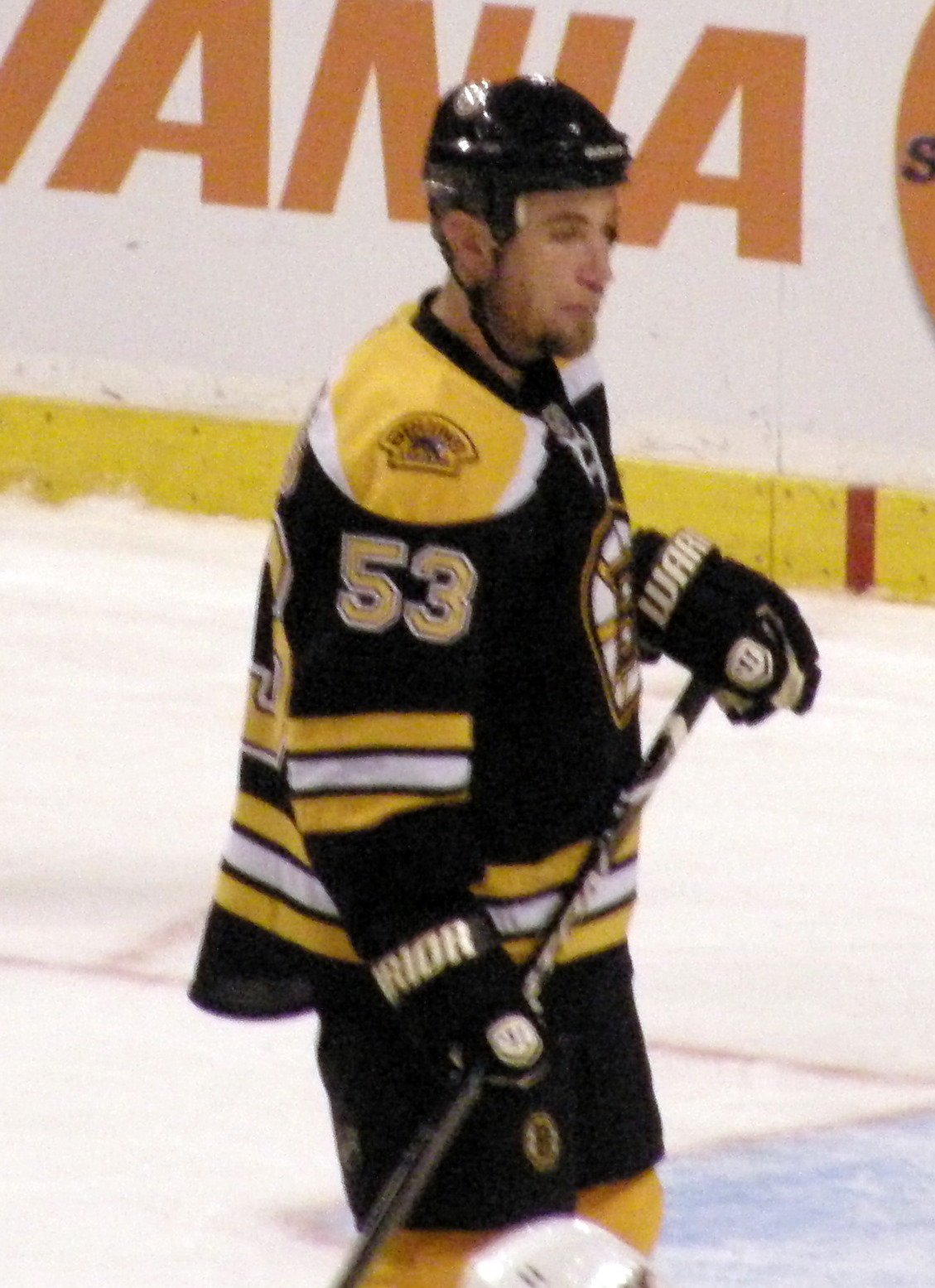 Derek Morris (D, BOS)